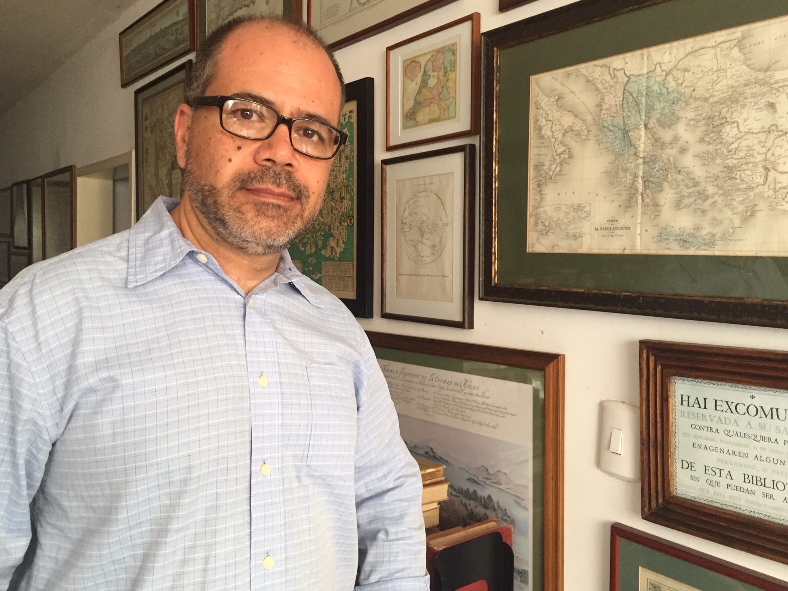 El profesor y escritor venezolano Mariano Nava Contreras.